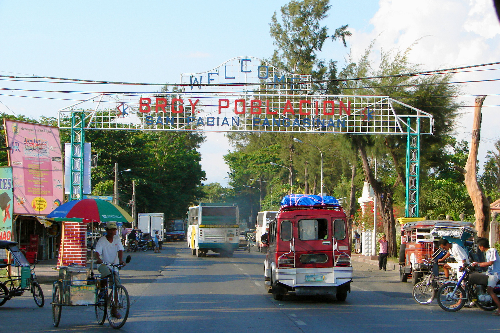 Poblacion of San Fabian, Pangasinan, Philippines